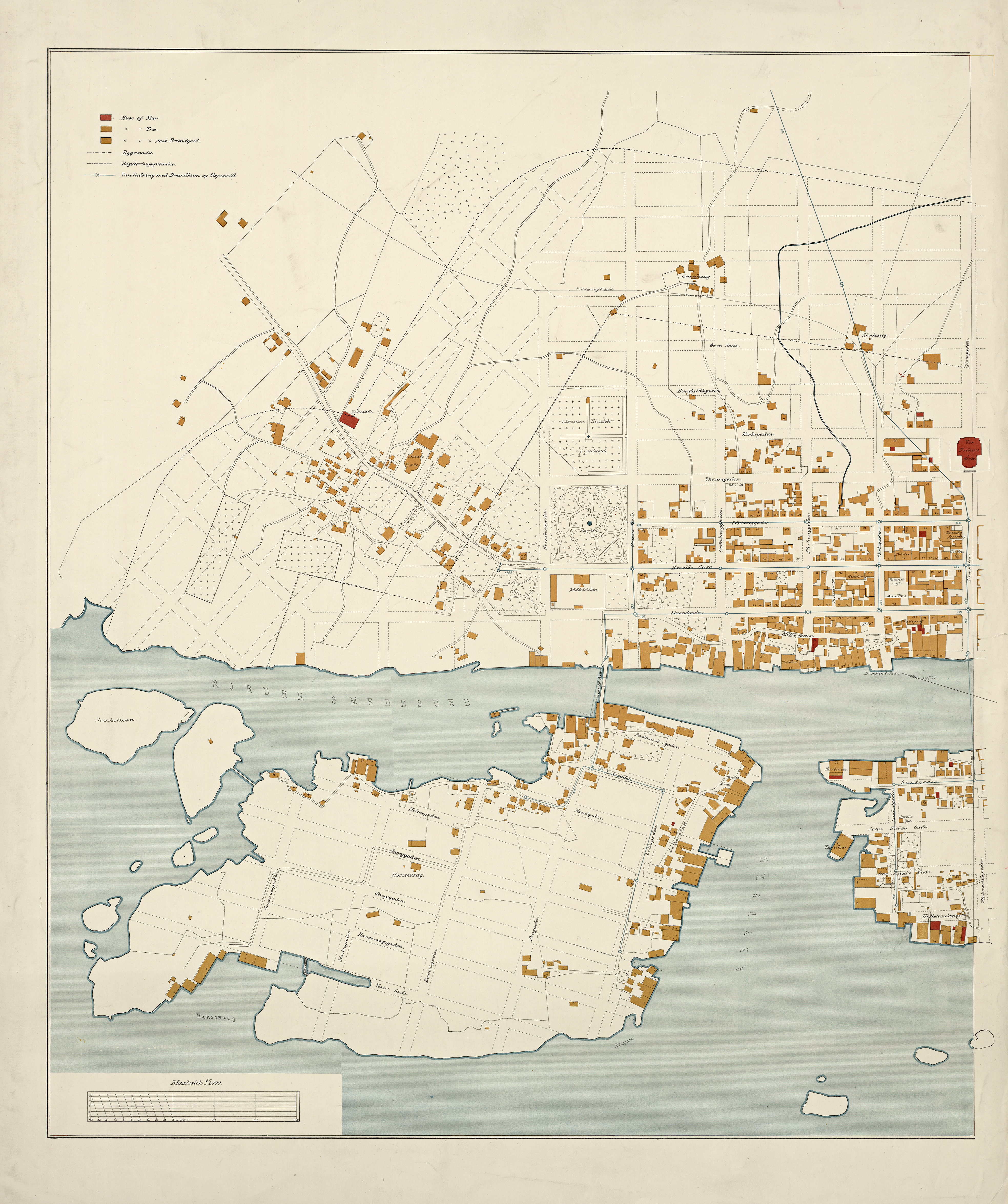 Kart over Haugebund (1902) blad 2/2